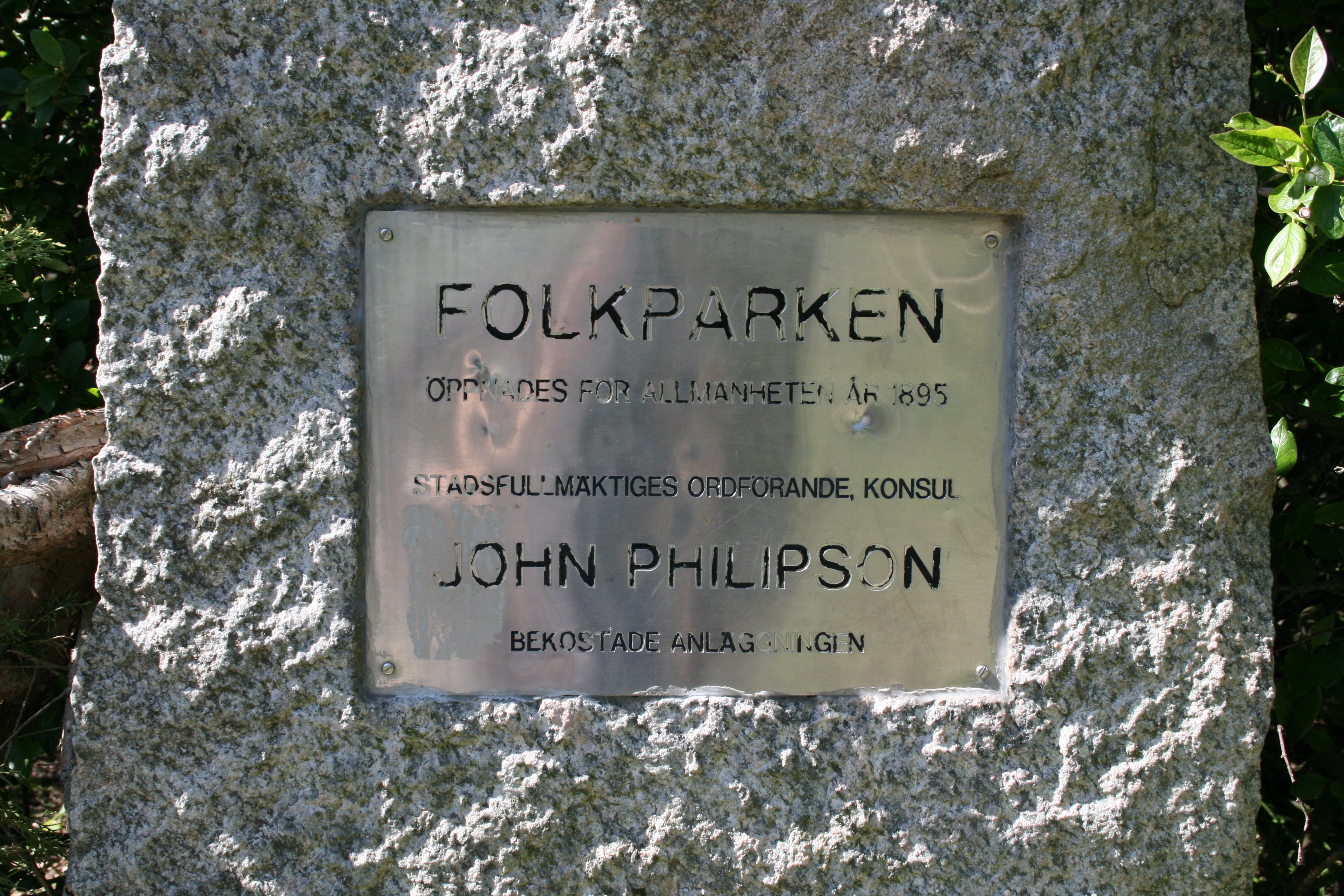 Folkparken i Norrköping 2008-05-10